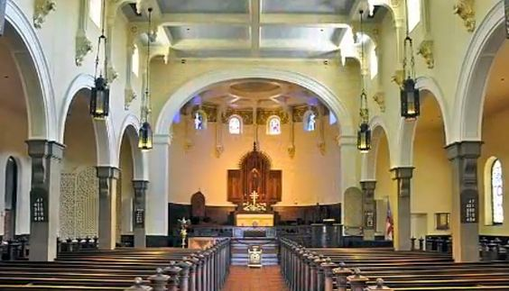 Inneres der St. Anne's Church in Annapolis, Maryland